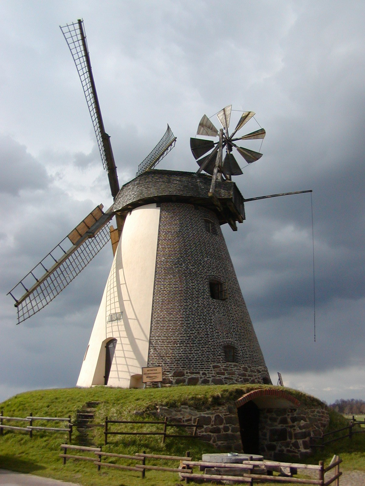 Windmühle Sühemmern Sonstiges: ...